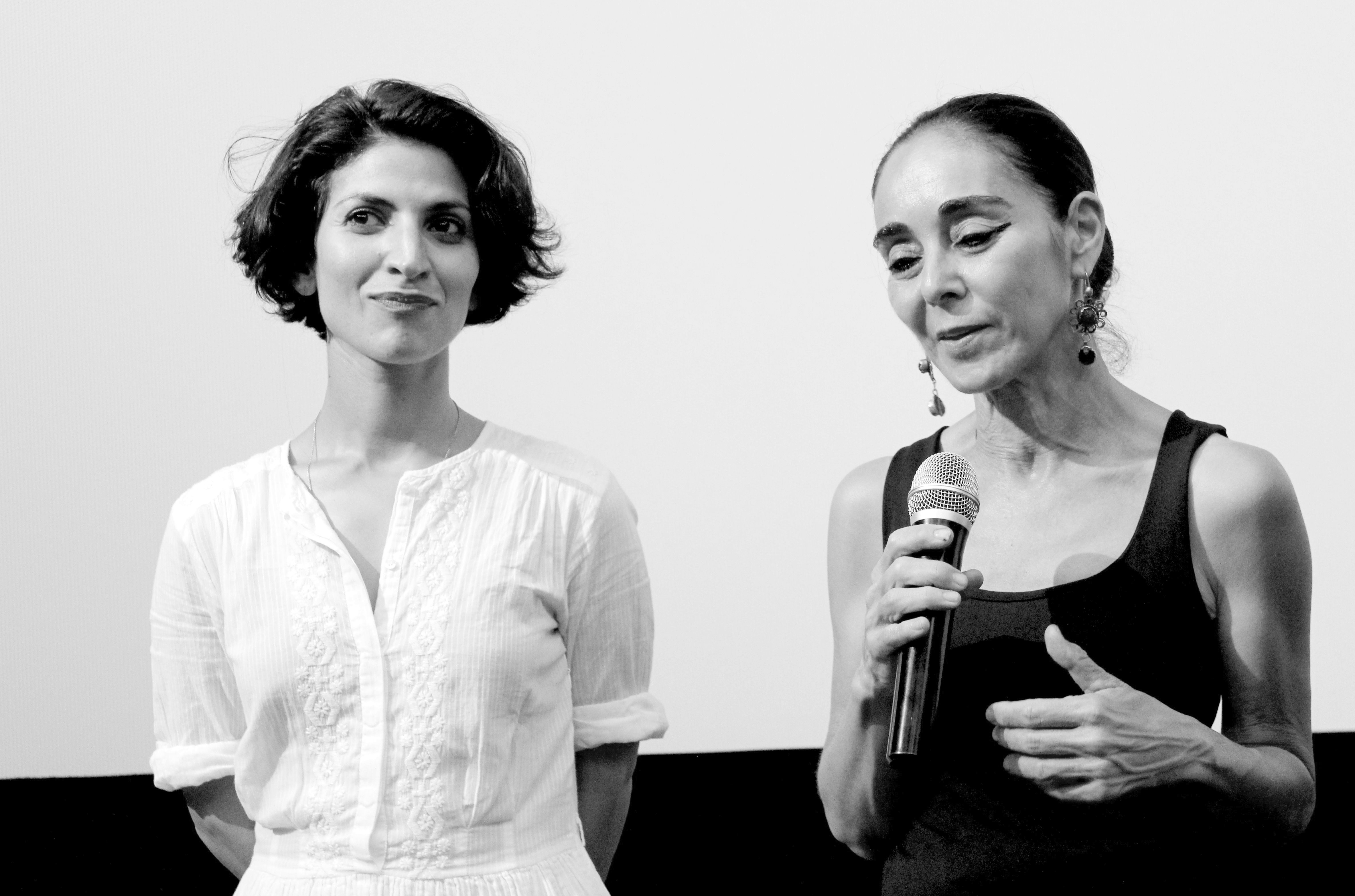 40223 Düsseldorf, Brunnenstraße 20. Filmvorstellung "Auf der Suche nach Oum Kulthum" im Metropol-Filmkunstkino. V.l.n.r.: Neda Rahmanian (Schauspielerin), Shirin Neshat (Regisseurin). Aufnahme von 2018.